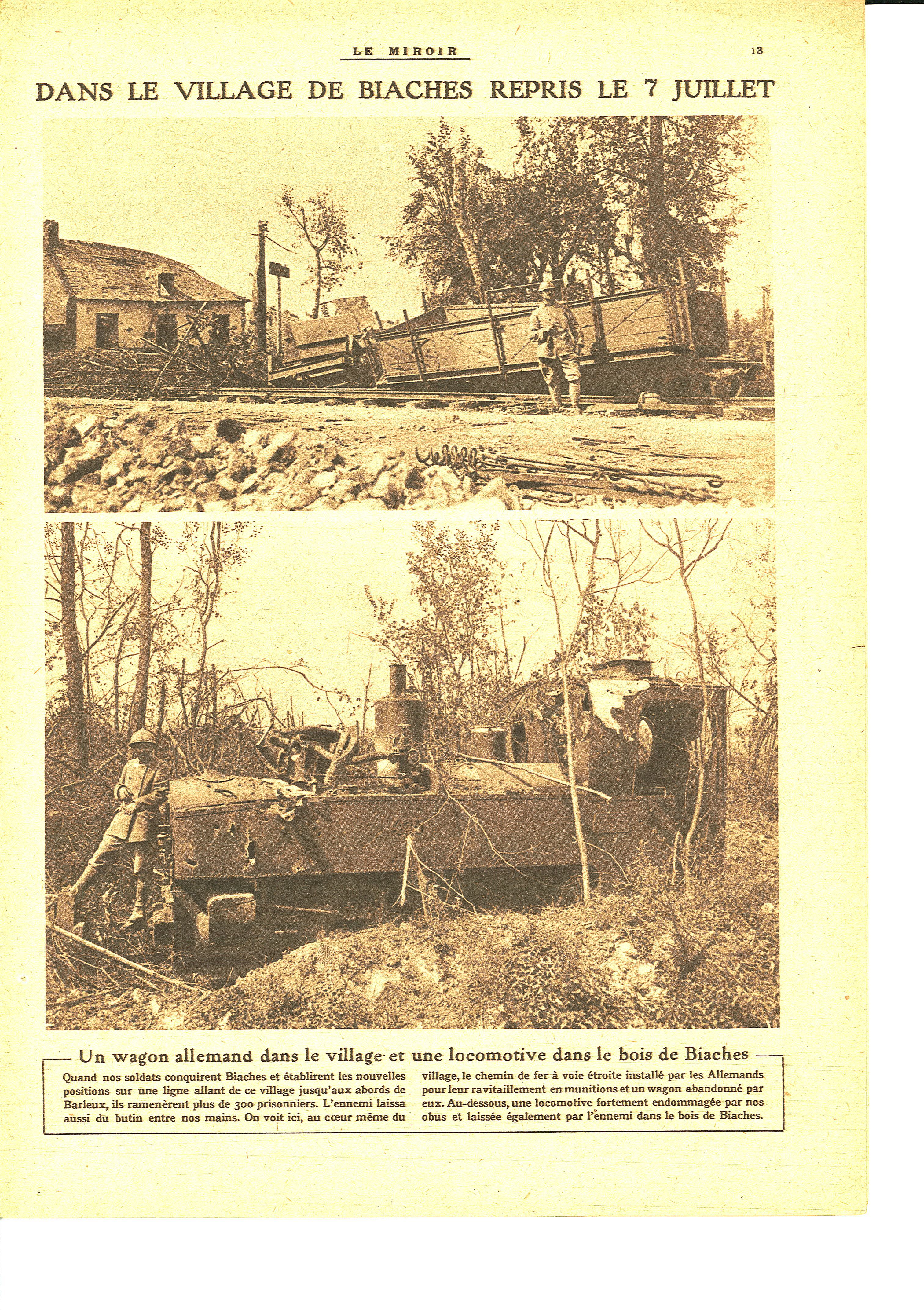 Le Miroir, dimanche 27 août 1916. N°144.